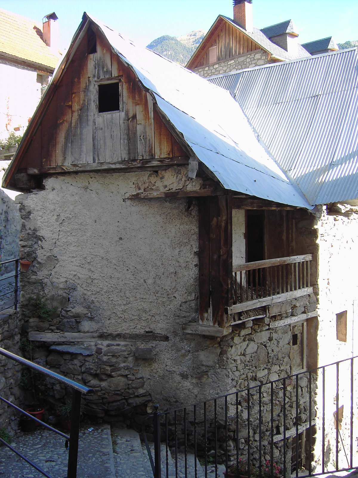 Una casa antigua en San Juan de Plan, donde a parte de la sustitución de sus tejados por placas de uralita, se conserva en general el aire tradicional d ela construcción.